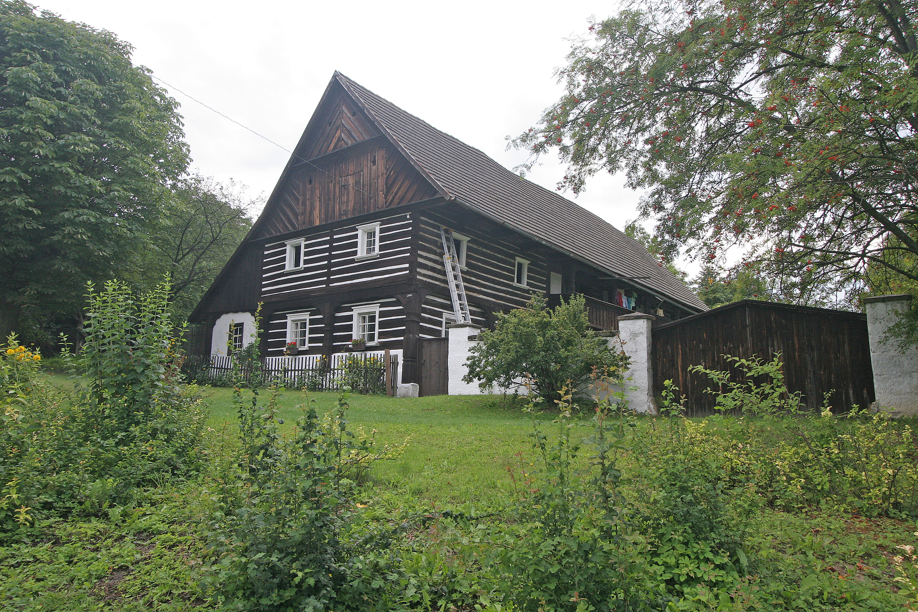 venkovský dům čp. 4, Lhota u Úštěku